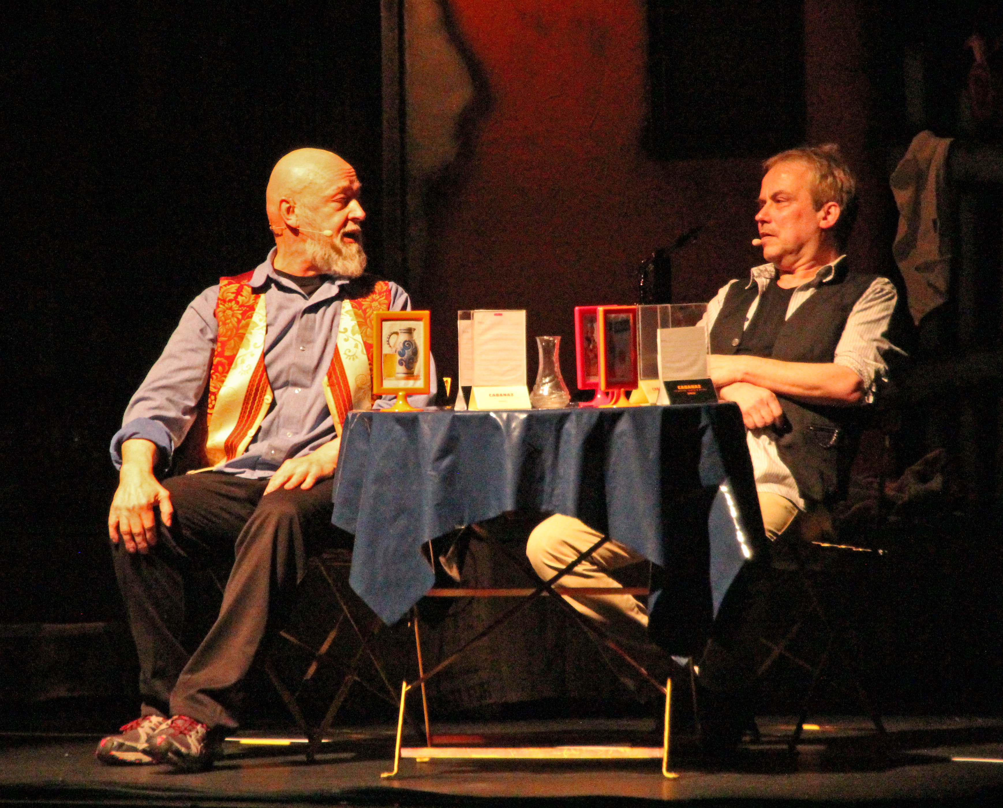 Bildinhalt: Links Gerd Knebel, rechts Henni Nachtsheim in der "Badesalz"-Show "Dö Chefs!". Aufnahmeort: Frankfurt-Höchst, Deutschland